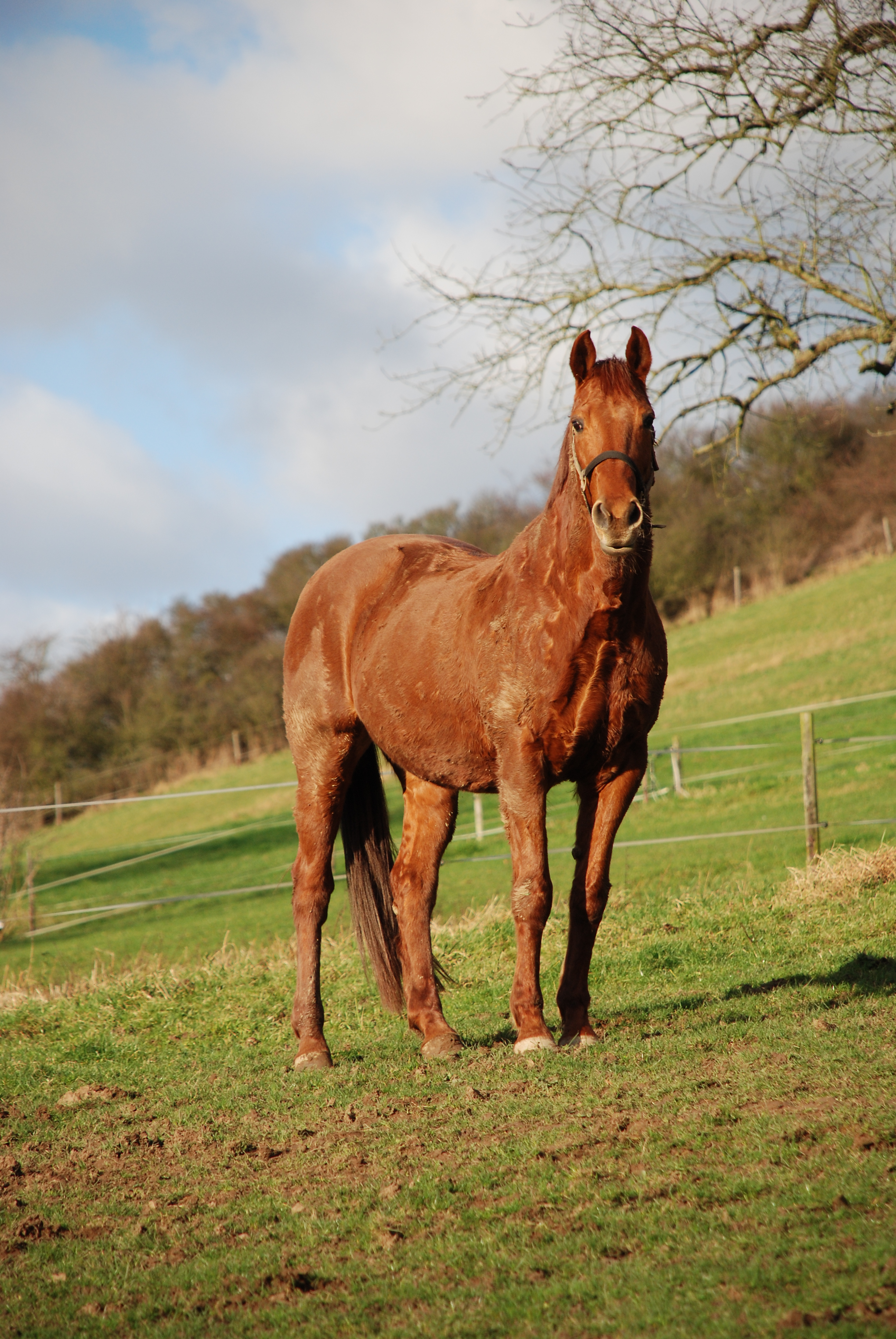 Rheinländer Stute